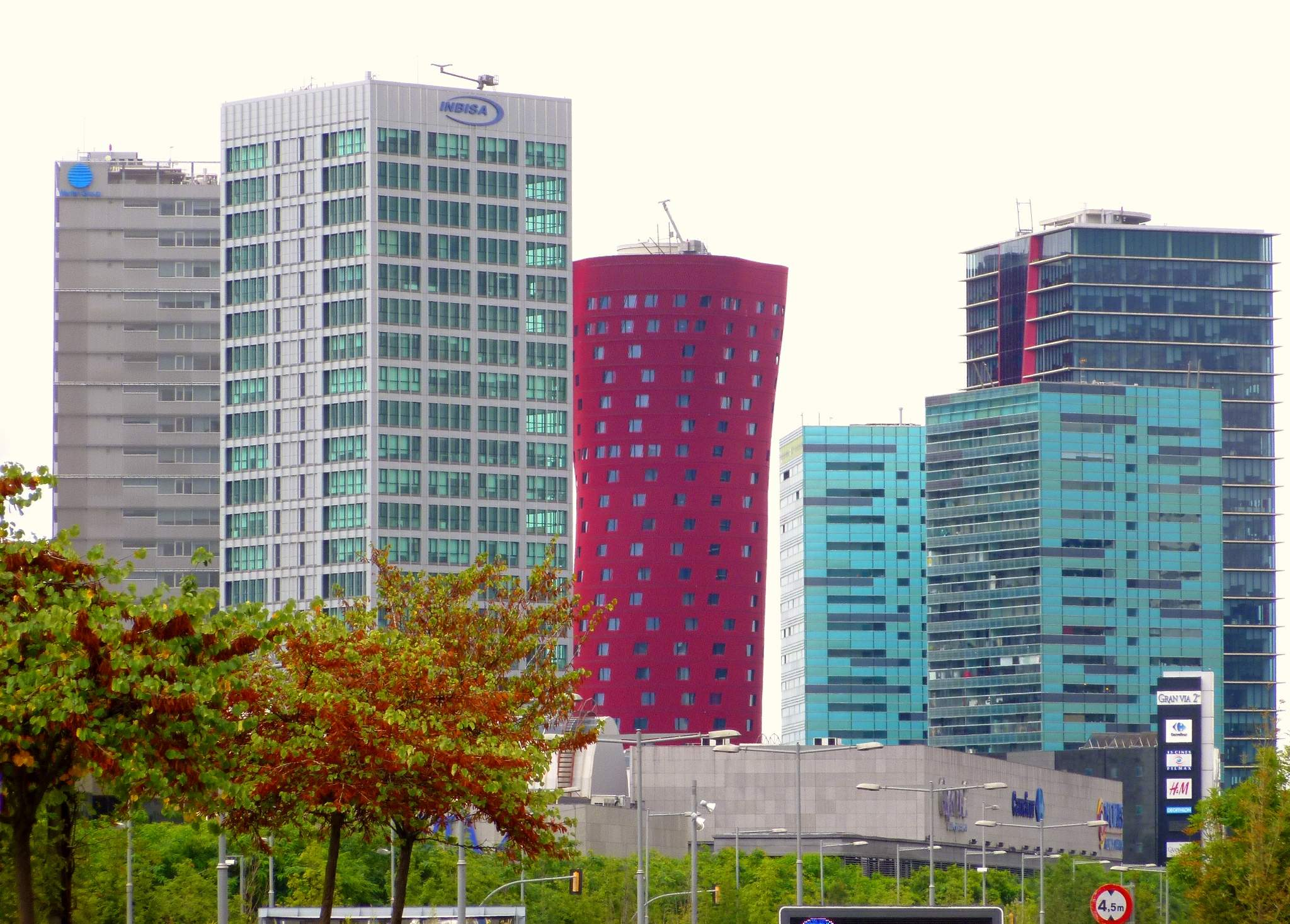 Torres Europa, Torres Porta Fira,Torre Inbisa y Torre Werfen, en la Plaza de Europa de Hospitalet de Llobregat